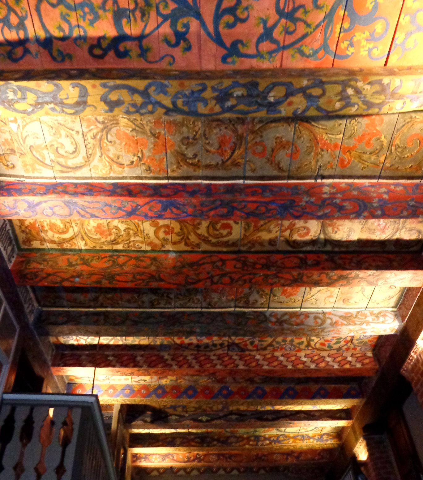 Deckenmalerei im Lüneburger Brömsehaus